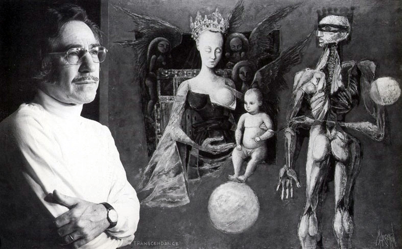 René Margotton en su estudio parisino